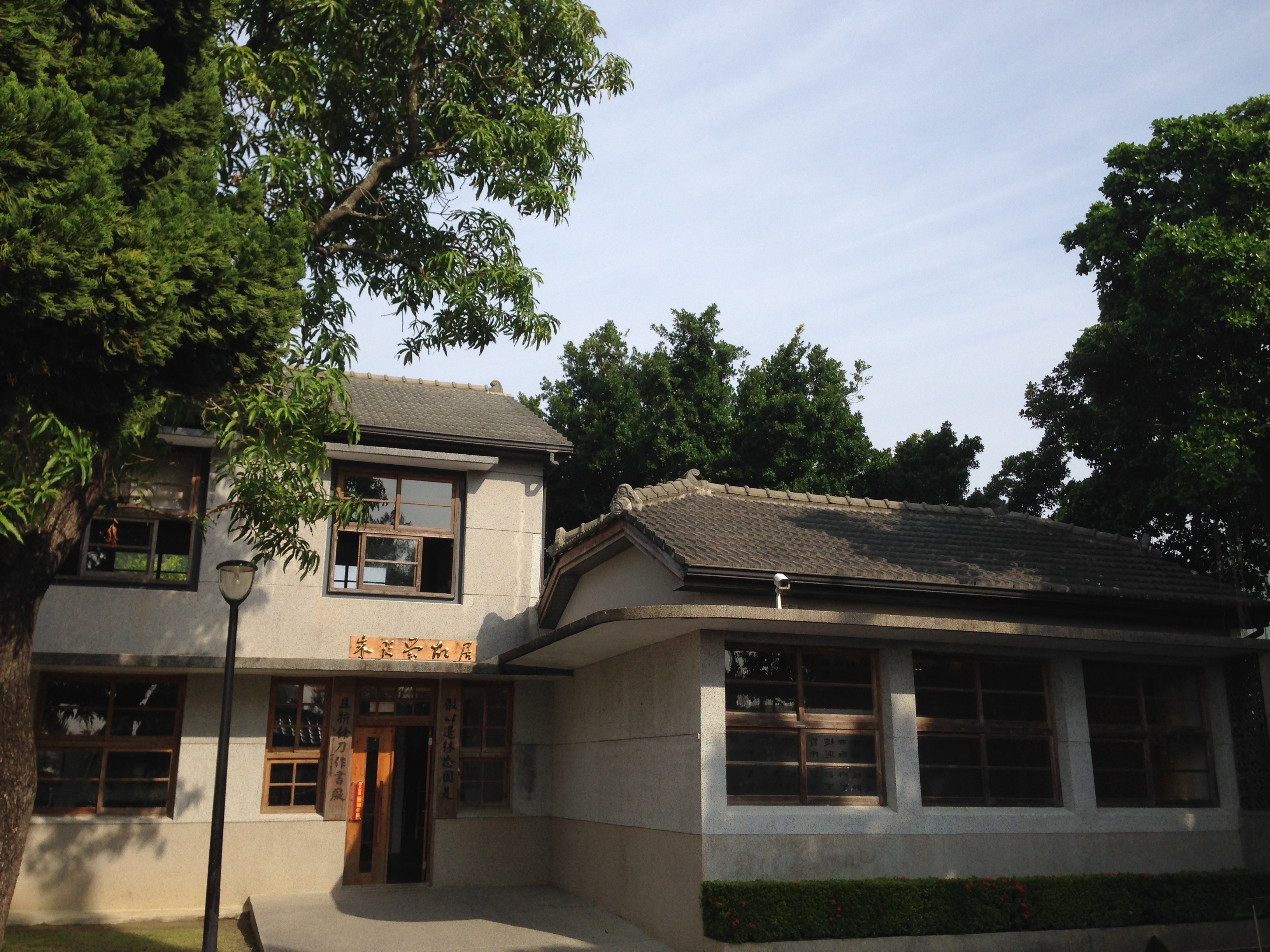 中文（台灣）: 朱玖瑩故居